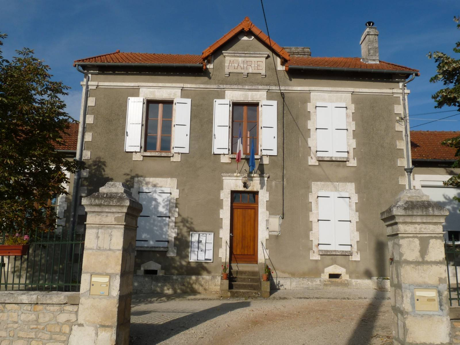 mairie de Chassiecq, Charente, France